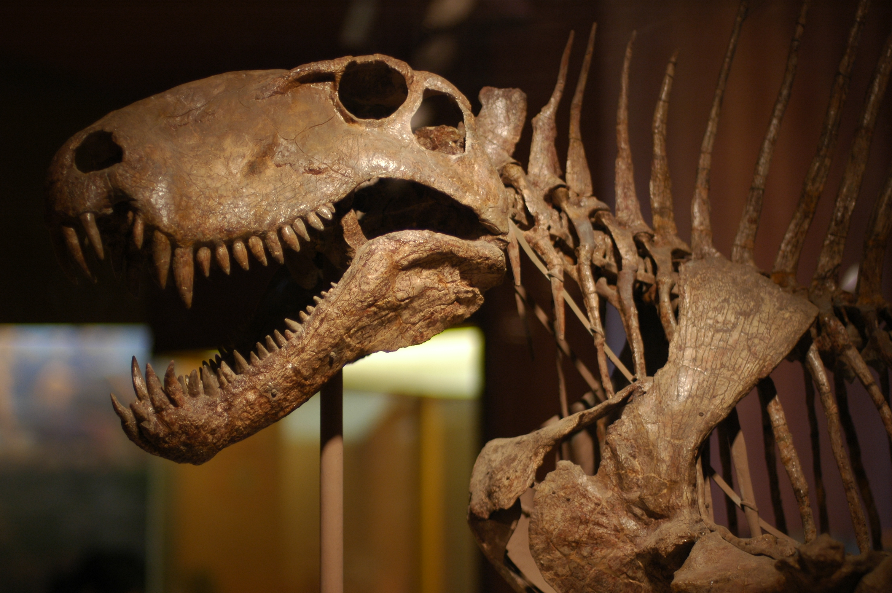 Dinosaur